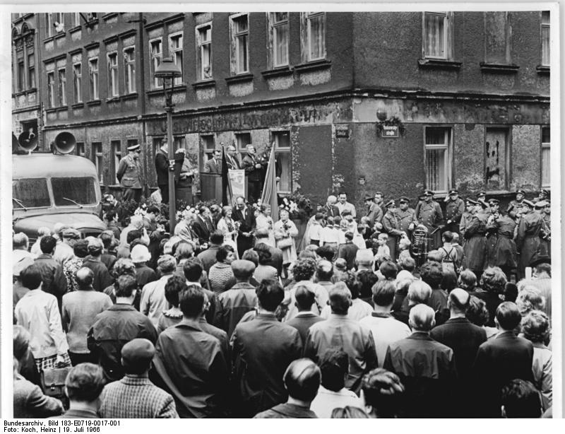 Leipzig, Namensgebung Hermann-Rudkowsky-Straße Zentralbild/Koch 19.7.1966 Leipziger Straße erhielt Namen gefallenen Spanienkämpfers. Den Namen des unvergessenen Leipziger Spanienkämpfers Hermann Rudkowsky erhielt am 18.7.1966 eine Straße im Südwesten der Messestadt. Neben Hunderten Leipzigern nahmen an der Kundgebung der Bruder des im Kampf um die Freiheit Spaniens gefallenen Kommunisten, Arno Rudkowsky, sowie Spanienkämpfer aus den USA und Irland sowie Touristen aus Frankreich und Rumänien teil.